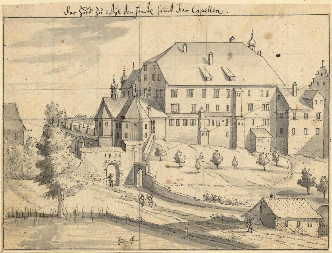 Der Hof in Wil (SG). Lavierte Federzeichnung von Johann Melchior Füssli